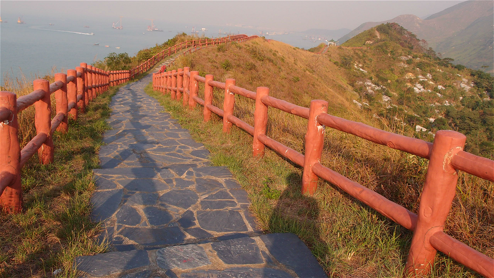 中文（香港）: 虎山的山頂